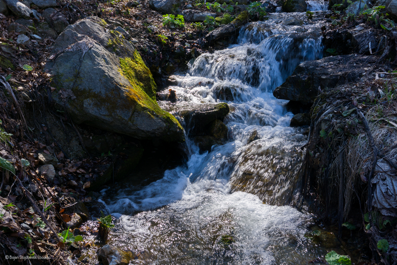 Водопад кој што се наоѓа над селото Прострање. Реката што тече поминува низ самото село.